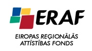 Eiropas Reģionālās attīstības fonds (ERAF)